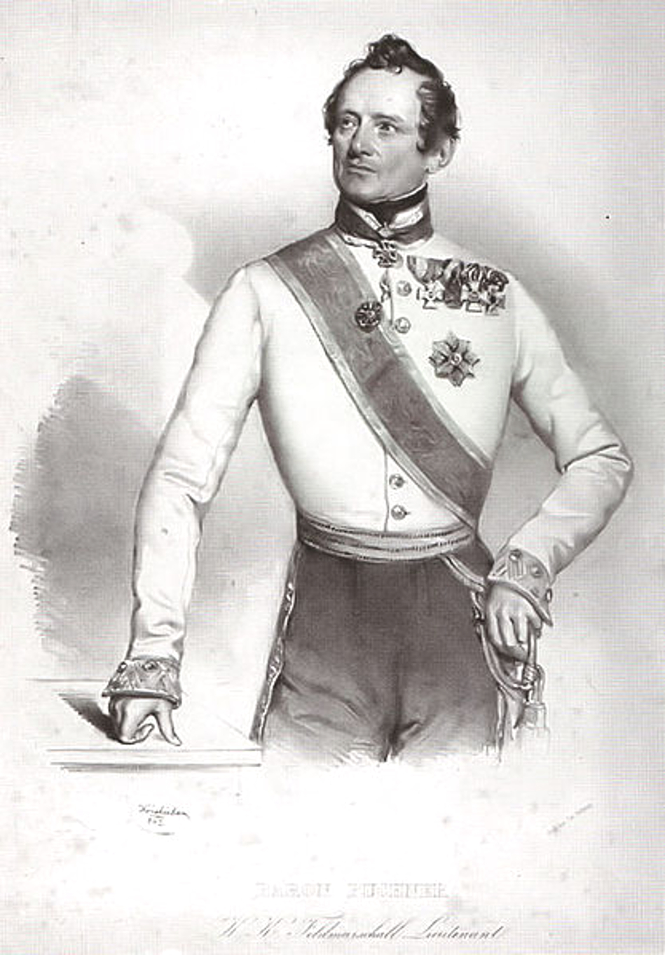 Puchner Antal lovassági tábornok, erdélyi főhadparancsnok (1779–1852) (Joseph Kriehuber litográfiája)